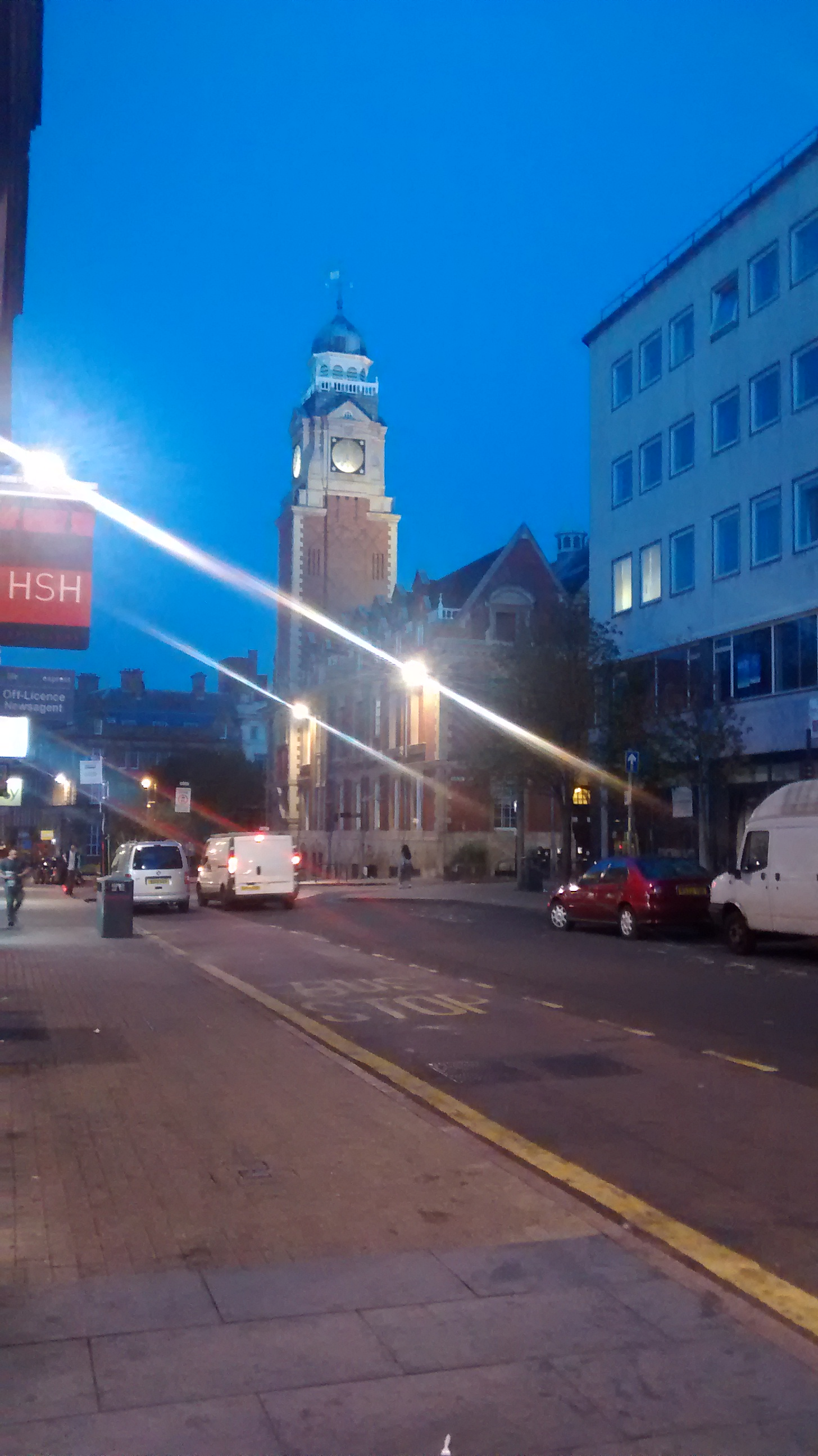 Ratusz nocą